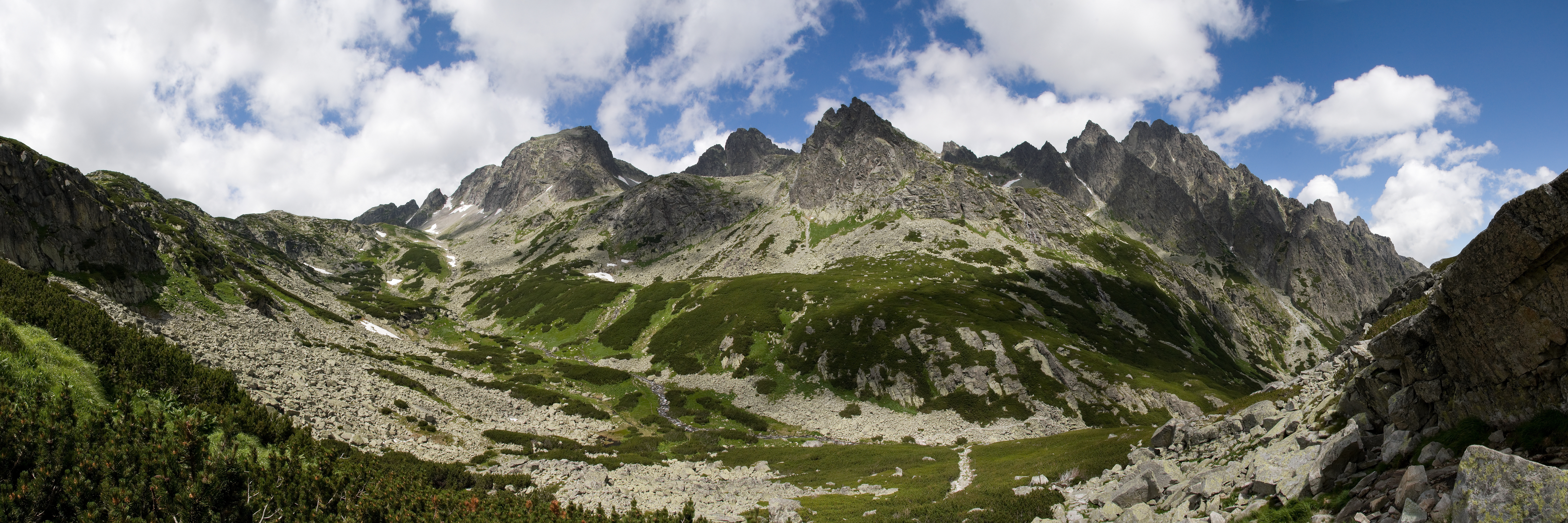 Veľká Studená dolina, Javorový štít Ostrý štít Strelecká veža Drobná veža Žltá veža Prostredný hrot